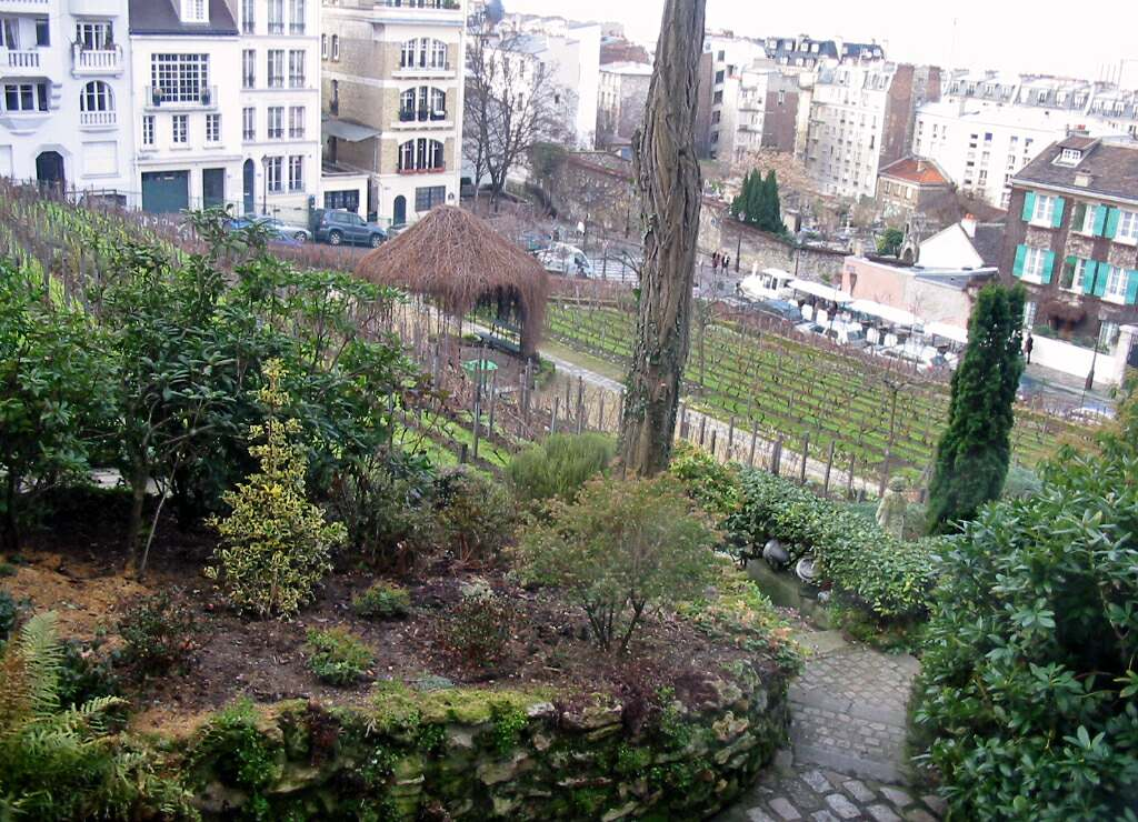 La vigne de Montmartre en hiver, vue du musée de Montmartre Photo JH Mora, janvier 2005